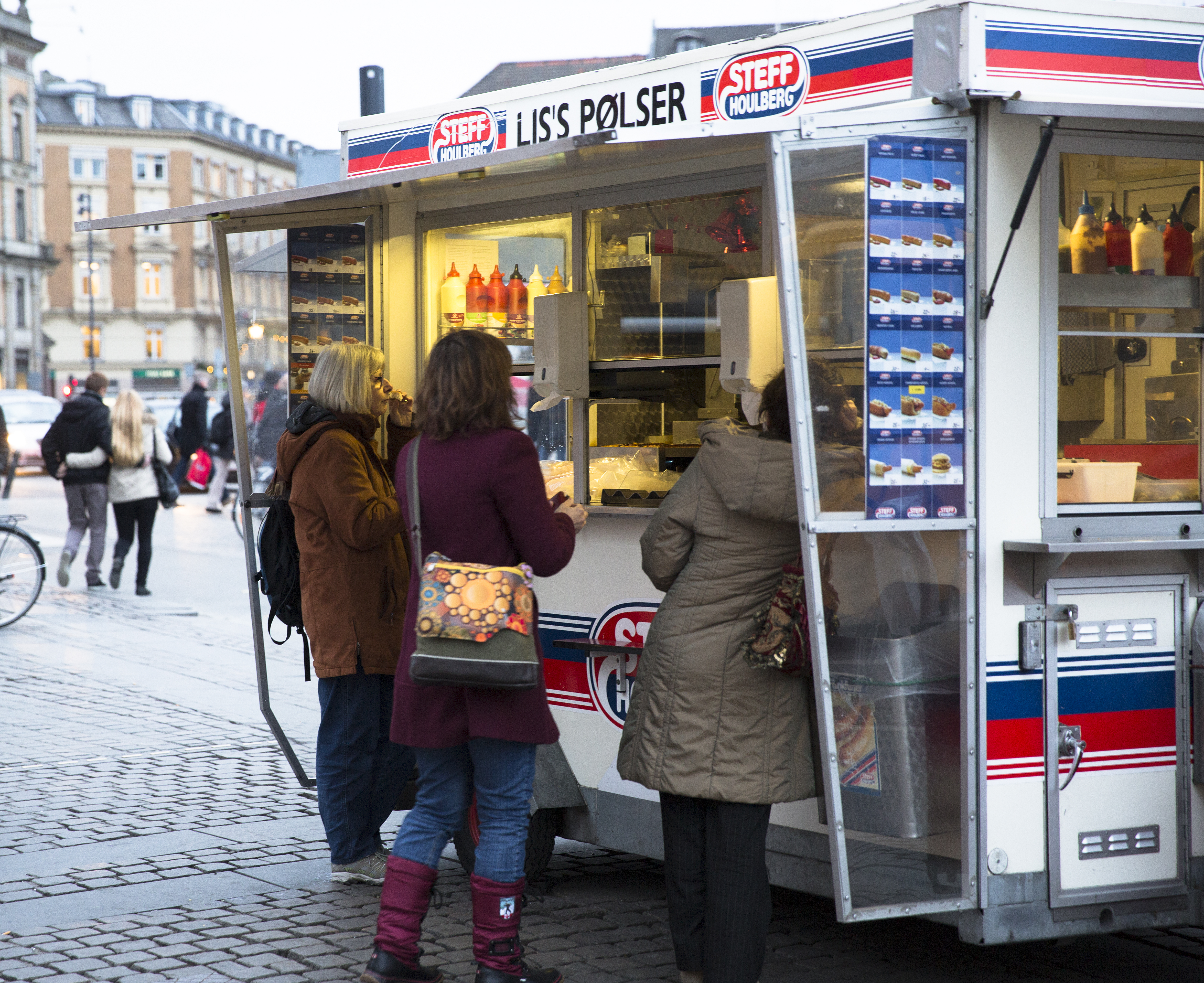 Pølsevogn vid Kongens Nytorv i København (Copenhagen) fotograderad 30 november 2012. Foto: News Øresund - Johan Wessman. © News Øresund. Bilden får fritt publiceras under förutsättning att källa anges (Foto: News Øresund + fotografnamn). The picture can be used freely under the prerequisite that the source is given (Photo: News Øresund + the name of the photografer. Set: Politics, Labour market Originalfil tillhandahålles gratis, kontakta: News Øresund, Malmö, Sweden. News Øresund är en oberoende regional nyhetsbyrå som ingår i projektet Øresund Media Platform som drivs av Øresundsinstituttet i partnerskap med Lunds universitet och Roskilde Universitet och med delfinansiering från EU (Interreg IV A Öresund) och 14 regionala, icke kommersiella, aktörer.